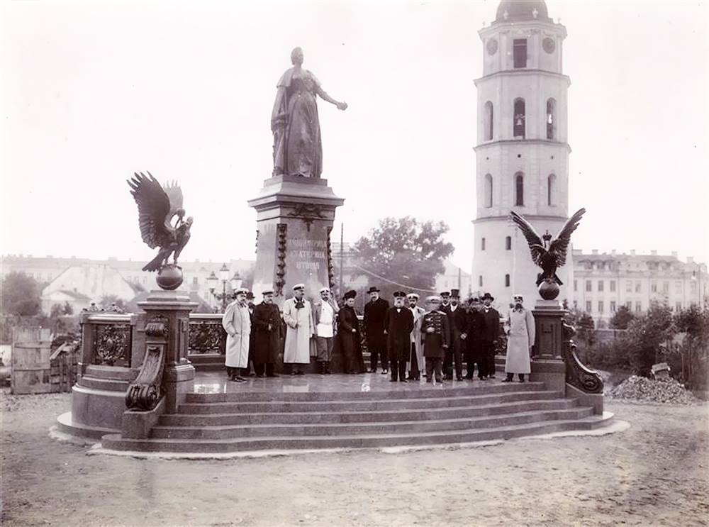 Grupė žmonių prie Jekaterinos II paminklo Vilniuje Katedros aikštėje. 1904 metai